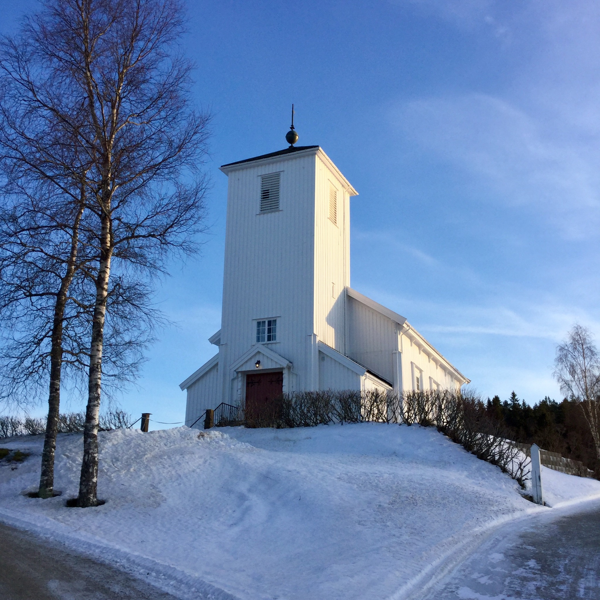 Klinga kirke i Namsos kommune, Trøndelag